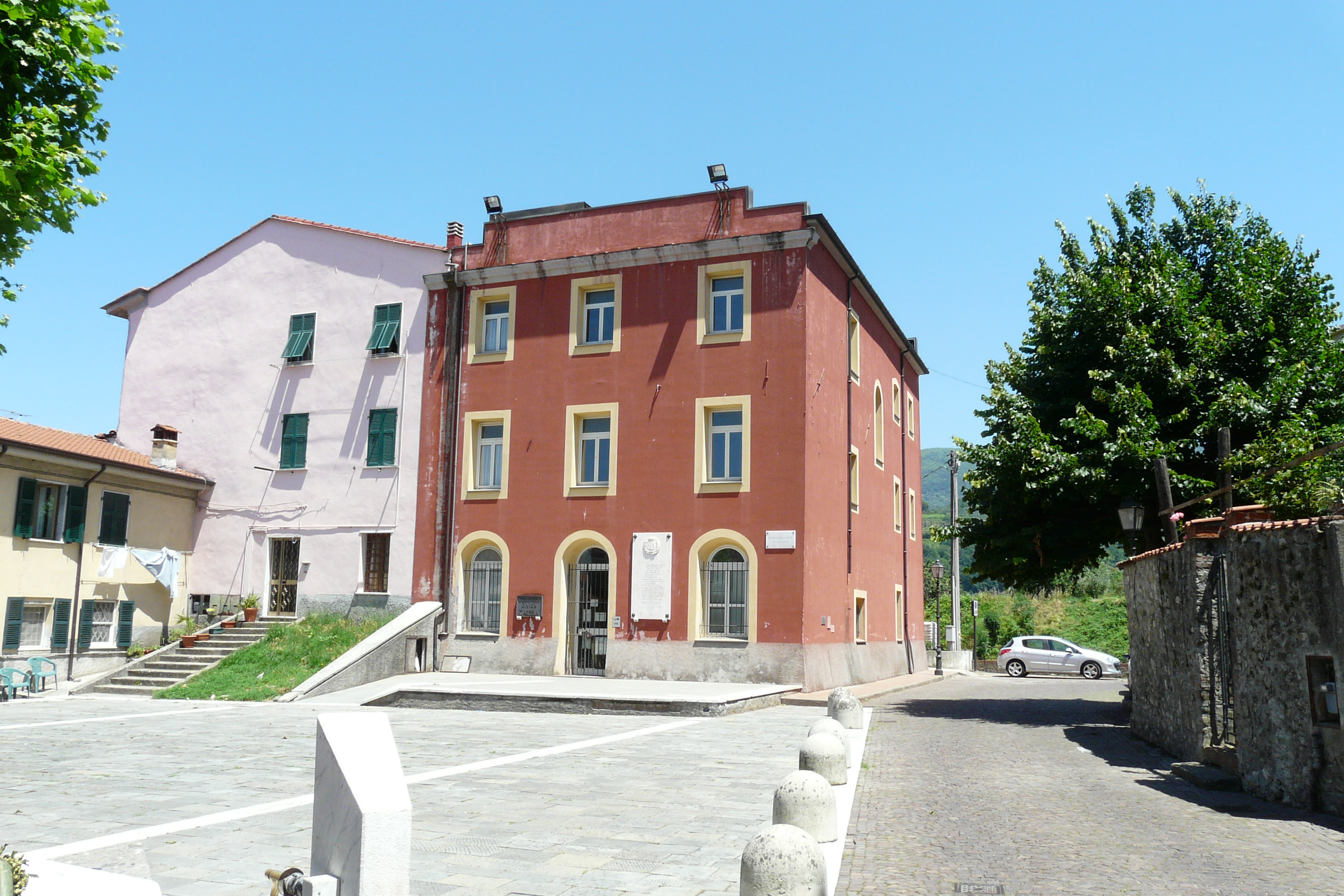 Biblioteca di Santo Stefano di Magra, Liguria, Italia